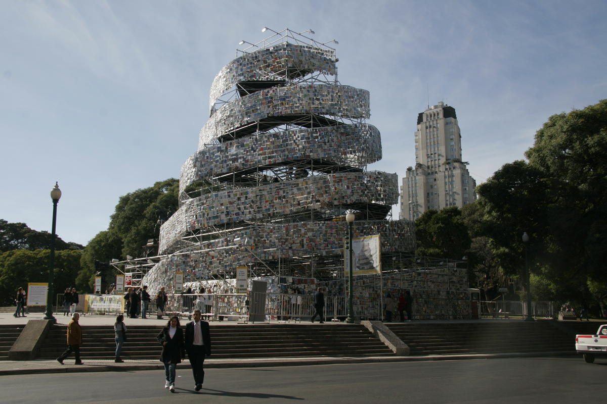 Las visitas a la Torre se realizarán en grupos con un guía y hay que solicitar previamente un turno ingresando a Foto: Estrella Herrera)